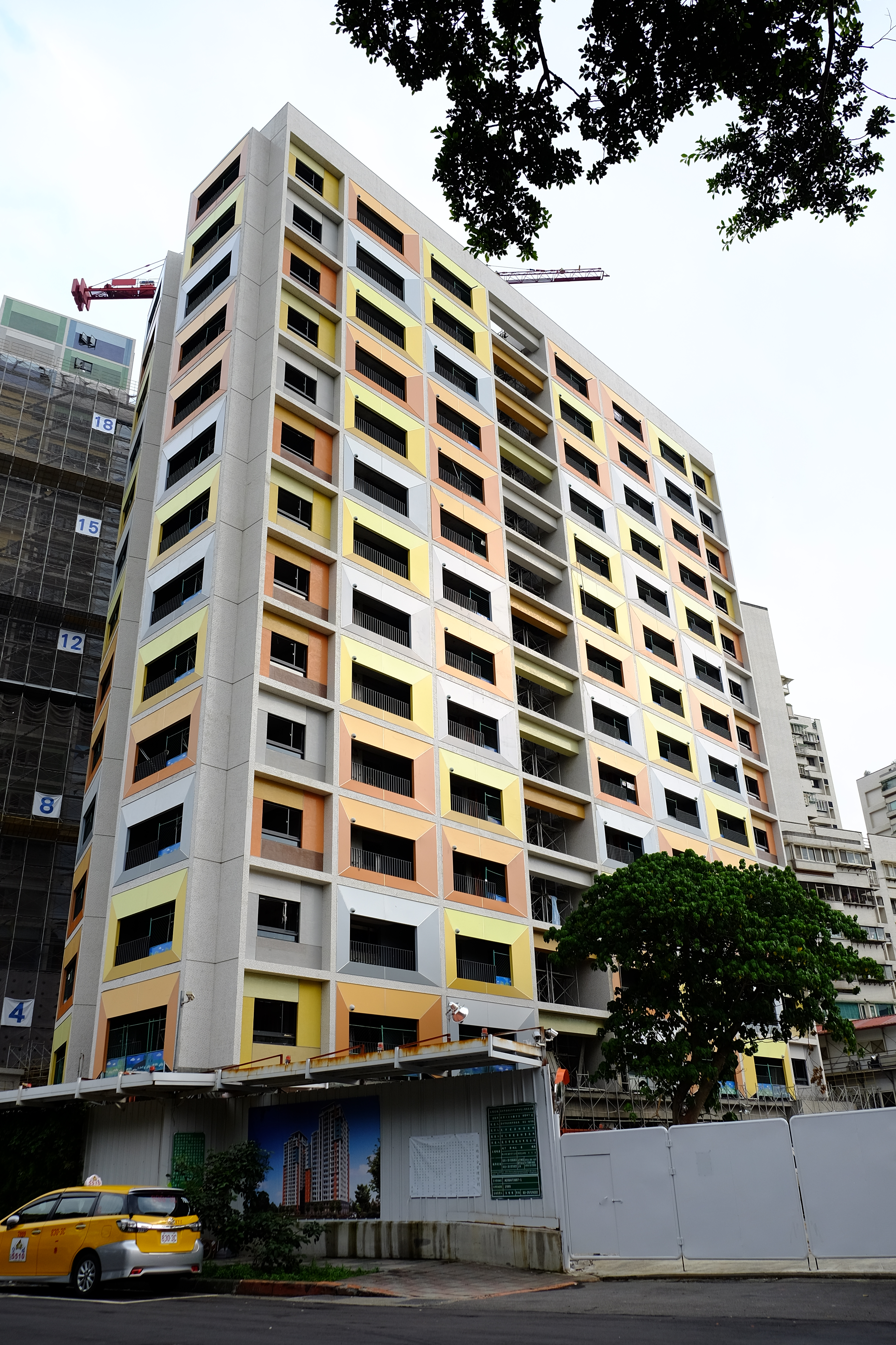 Wanhua Youth Housing 2018 萬華青年住宅